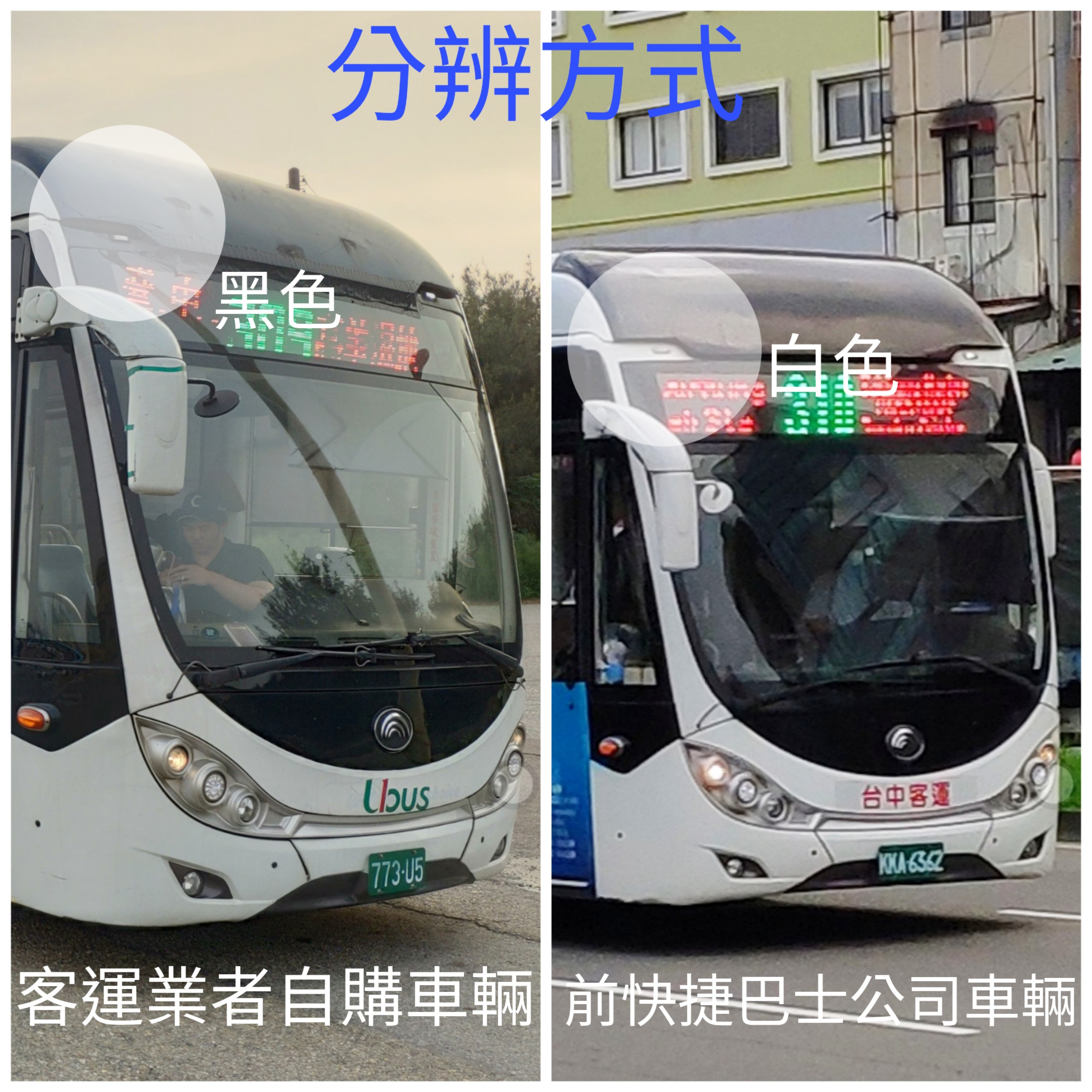 台中宇通雙節公車分辨方式，由細節可分辨出該車來源。